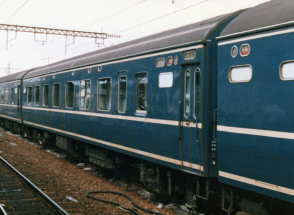 国鉄20系客車 ナロネ21 145